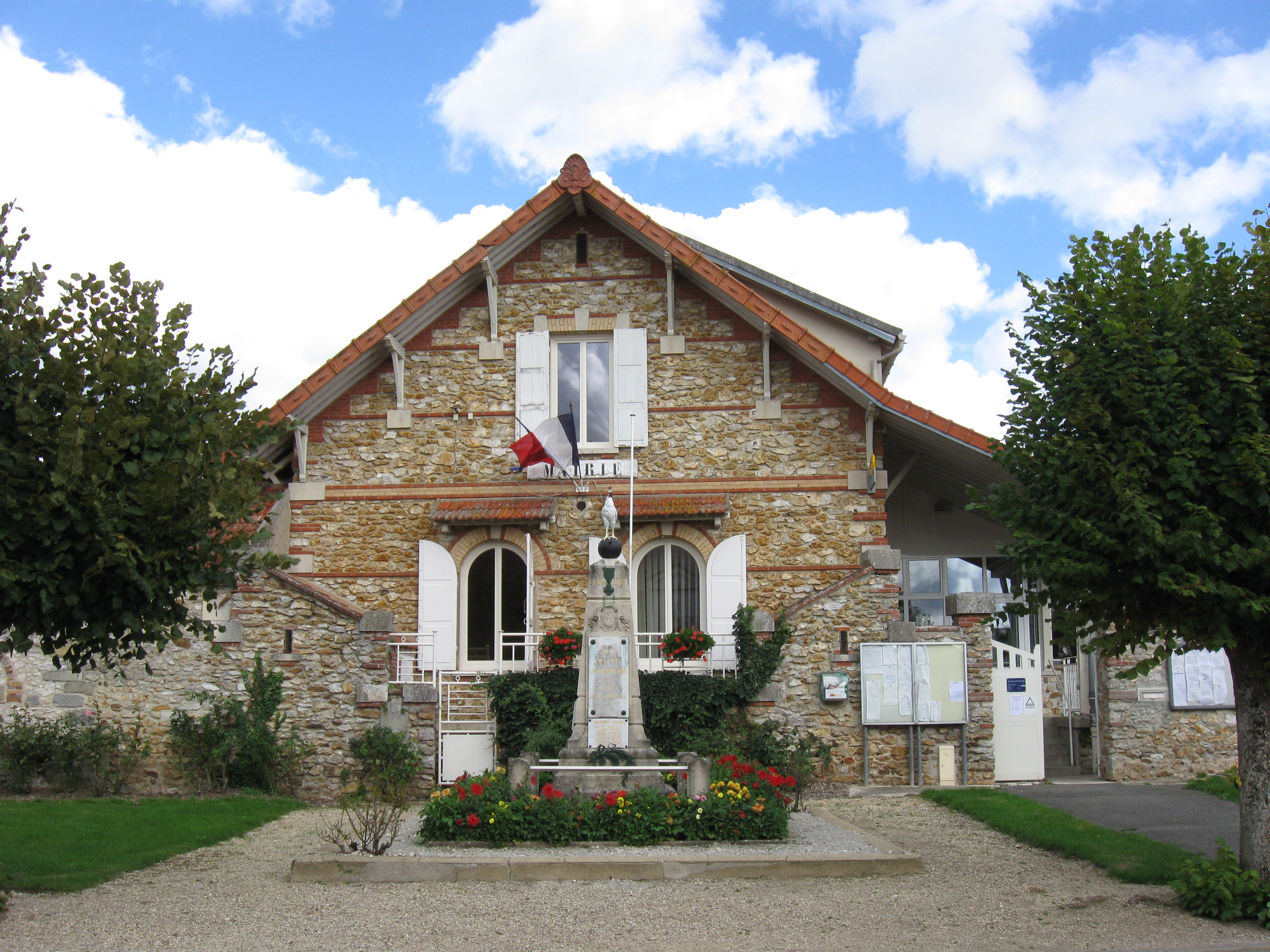 Mairie d'Échouboulains. (Seine-et-Marne, région Île-de-France).